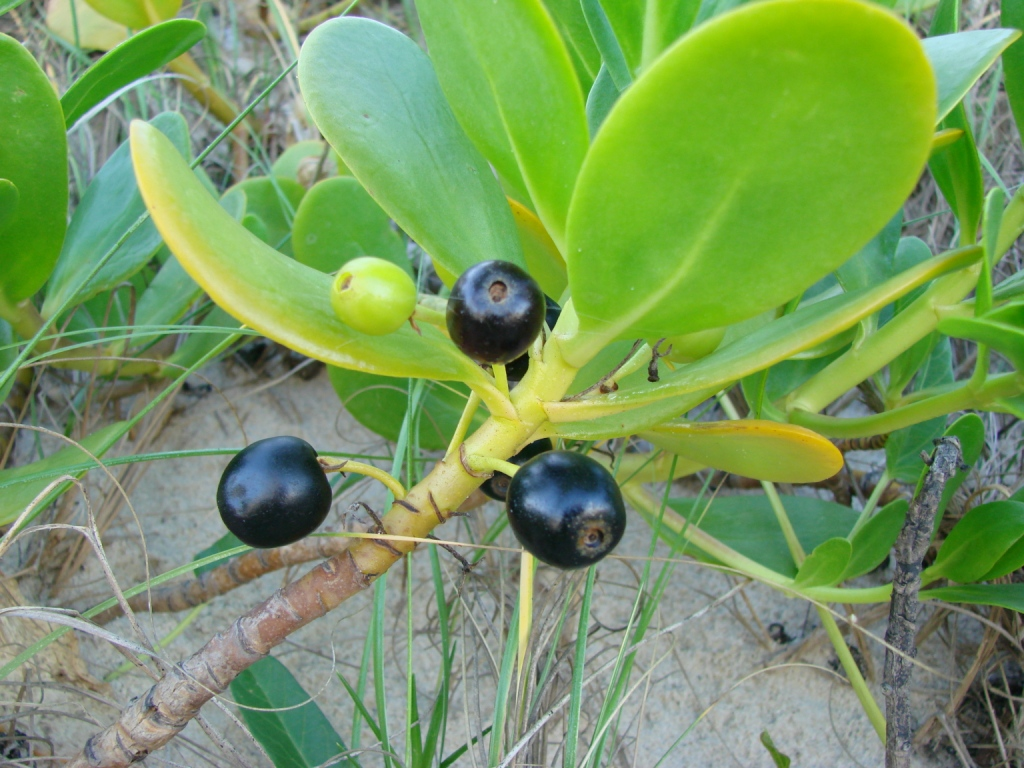 Scaevola plumieri - GOODENIACEAE - Praia do Mo�ambique - Florian�polis - SC - Brasil